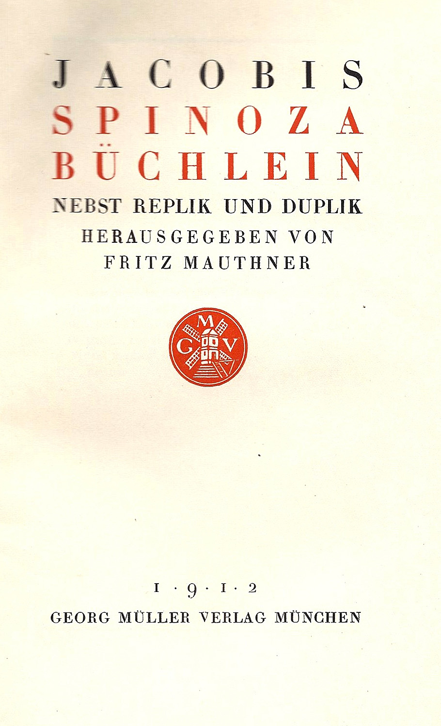 Titelseite von Jacobs Spinoza-Büchlein in der von Fritz Mauthner hg, "Bibliothek der Philosophen". München 1912